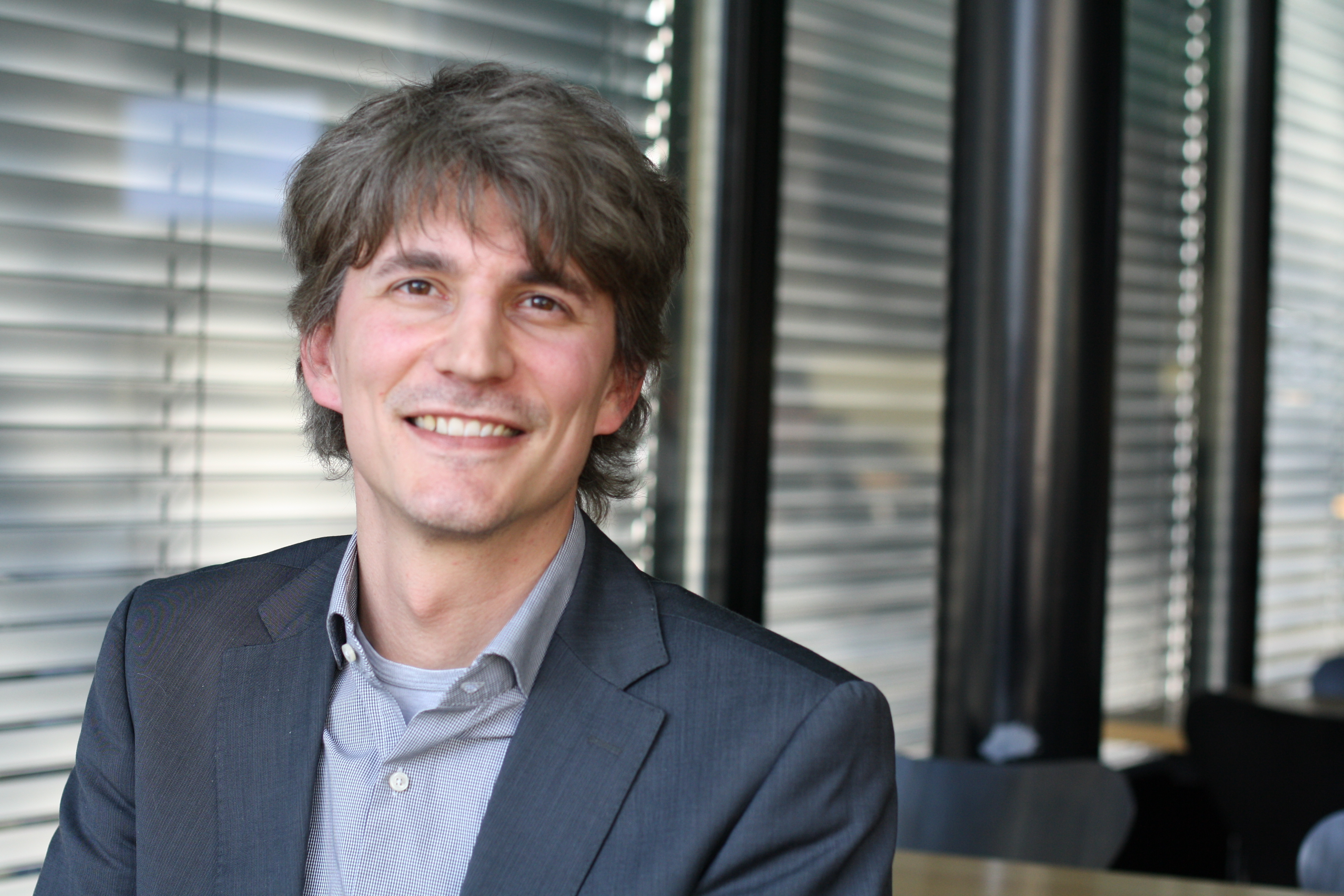 Jeronim Perović, Aufnahme an der Universität Zürich, 2012